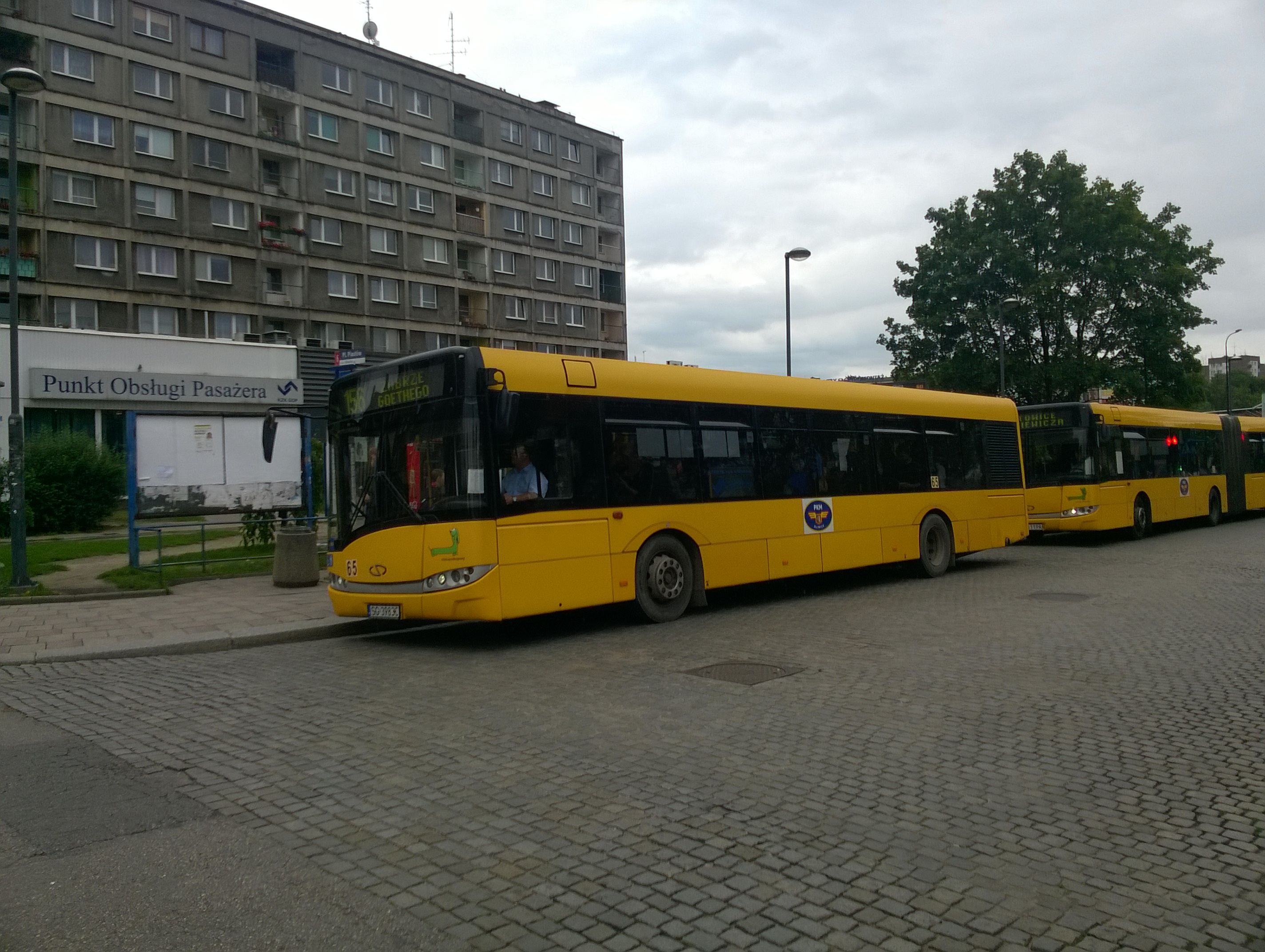 Solaris Urbino 12 i 18 w Gliwicach na przystanku Plac Piastów